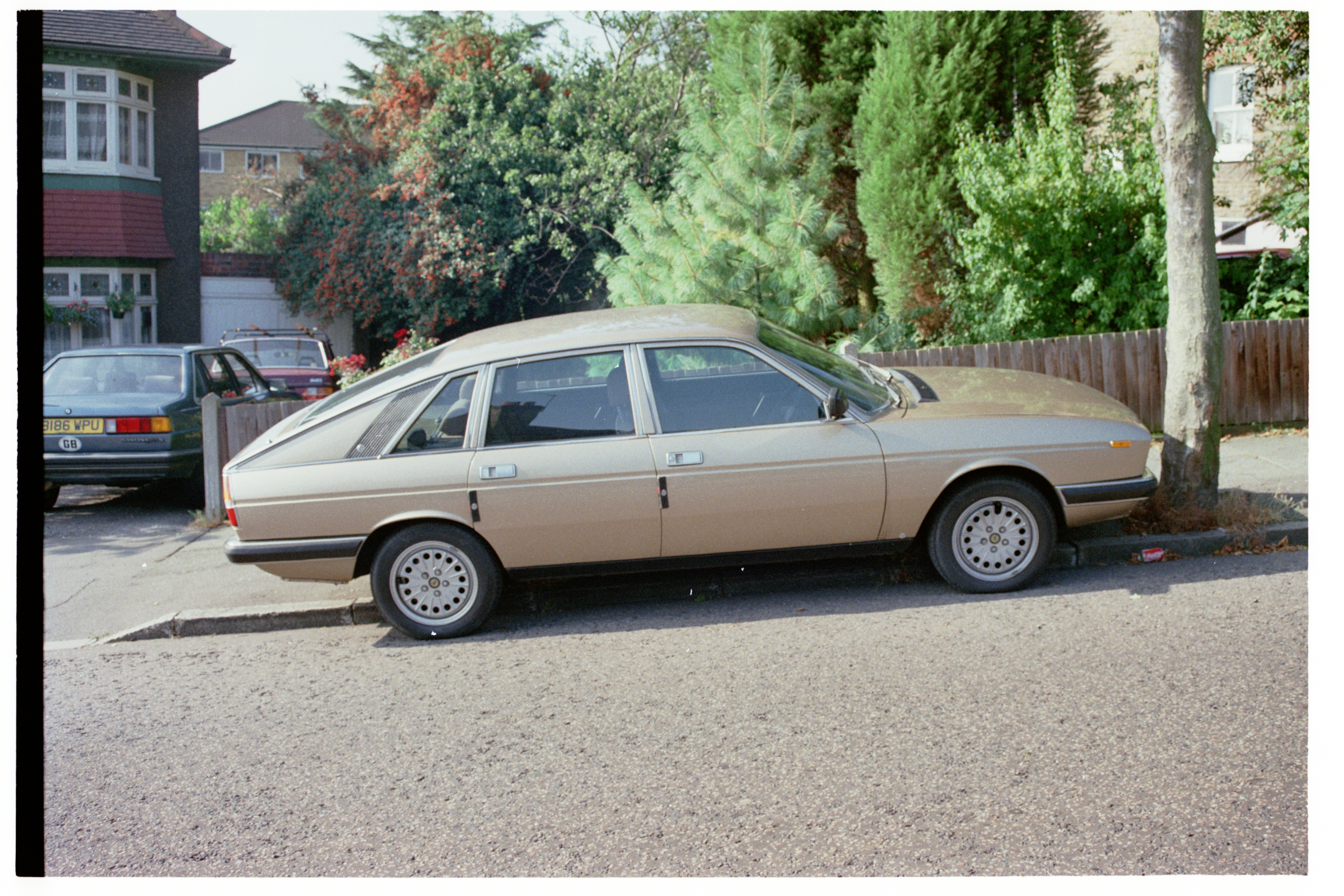 LanciaGammaC849RPNin1989A